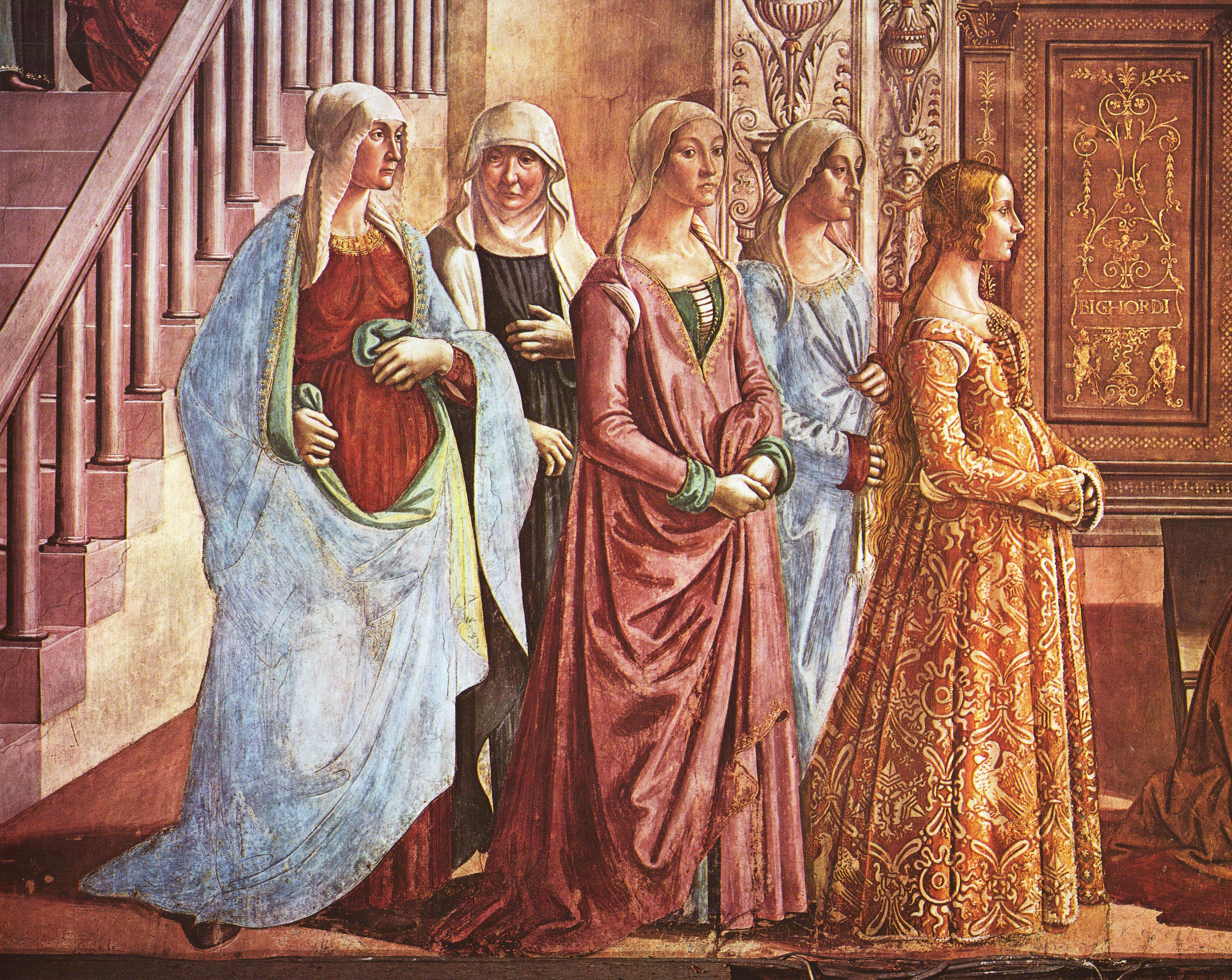 Detail aus dem Fresko "Geburt Mariä"